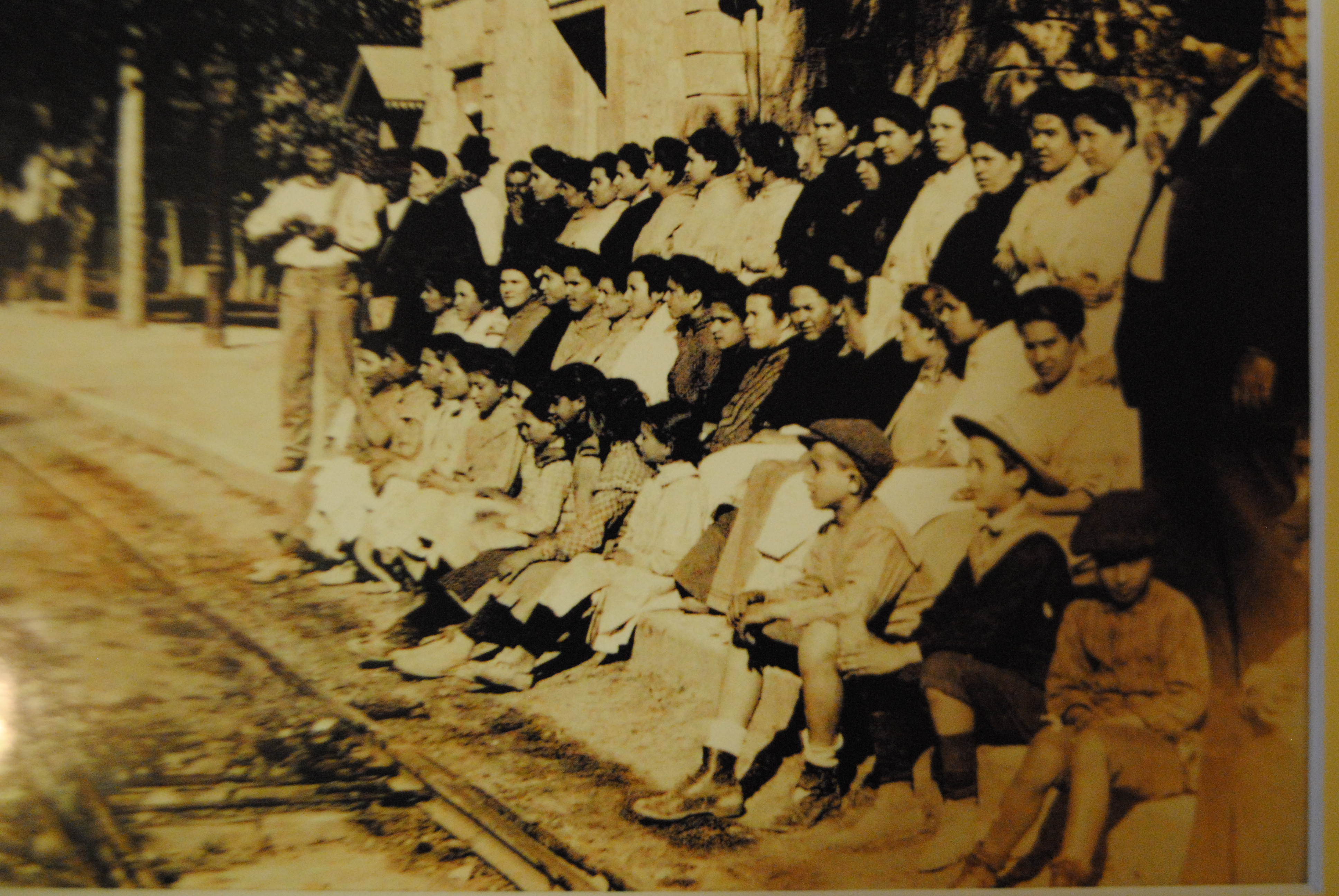 Grup de Barraleres de la fàbrica d'Andreu Bestard (1913)